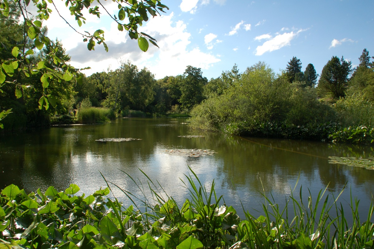 Botanischer Garten München-Nymphenburg, Bayern, Deutschland